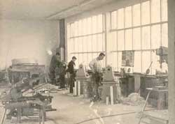 Metallwerkstatt der Jugendhilfe Johannesburg im Jahr 1965